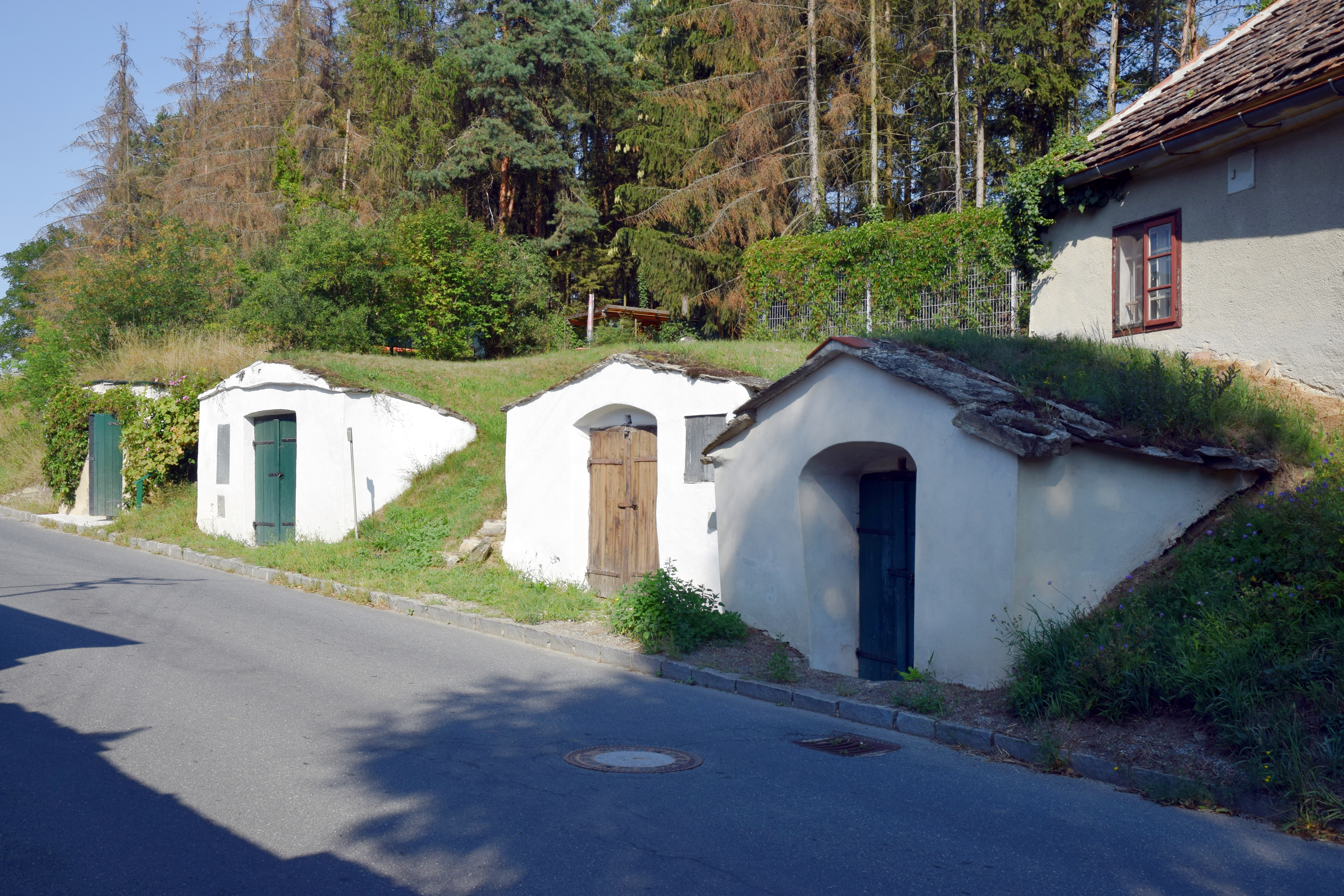 Kellergasse Riegersburger Straße in der KG Niederfladnitz in Hardegg (Niederösterreich)